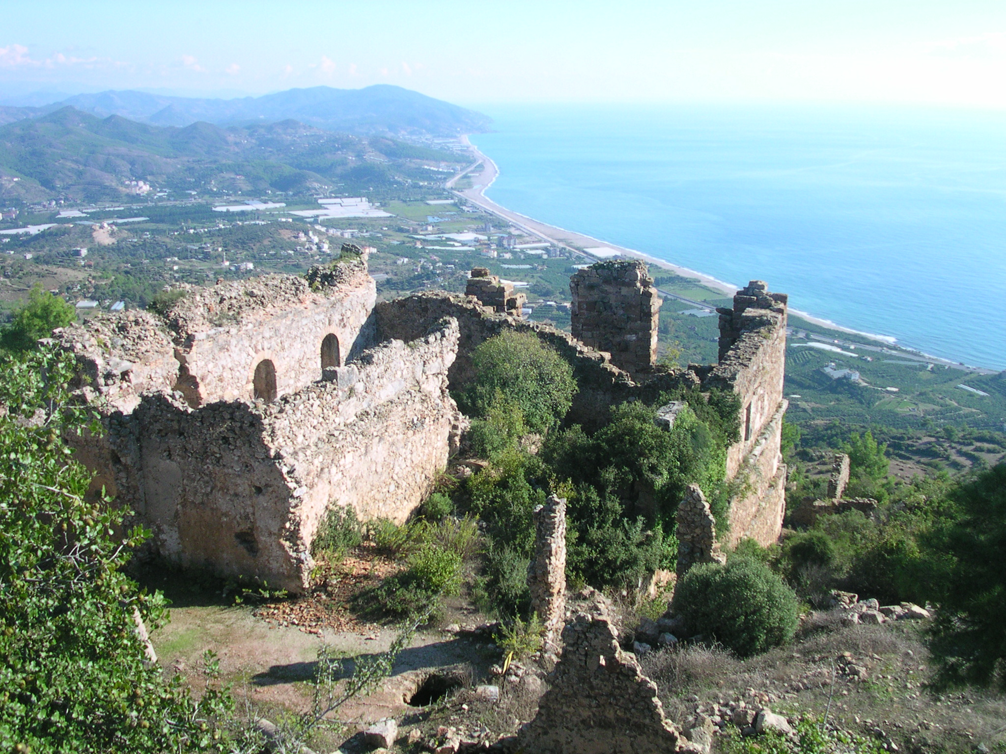 Syedra